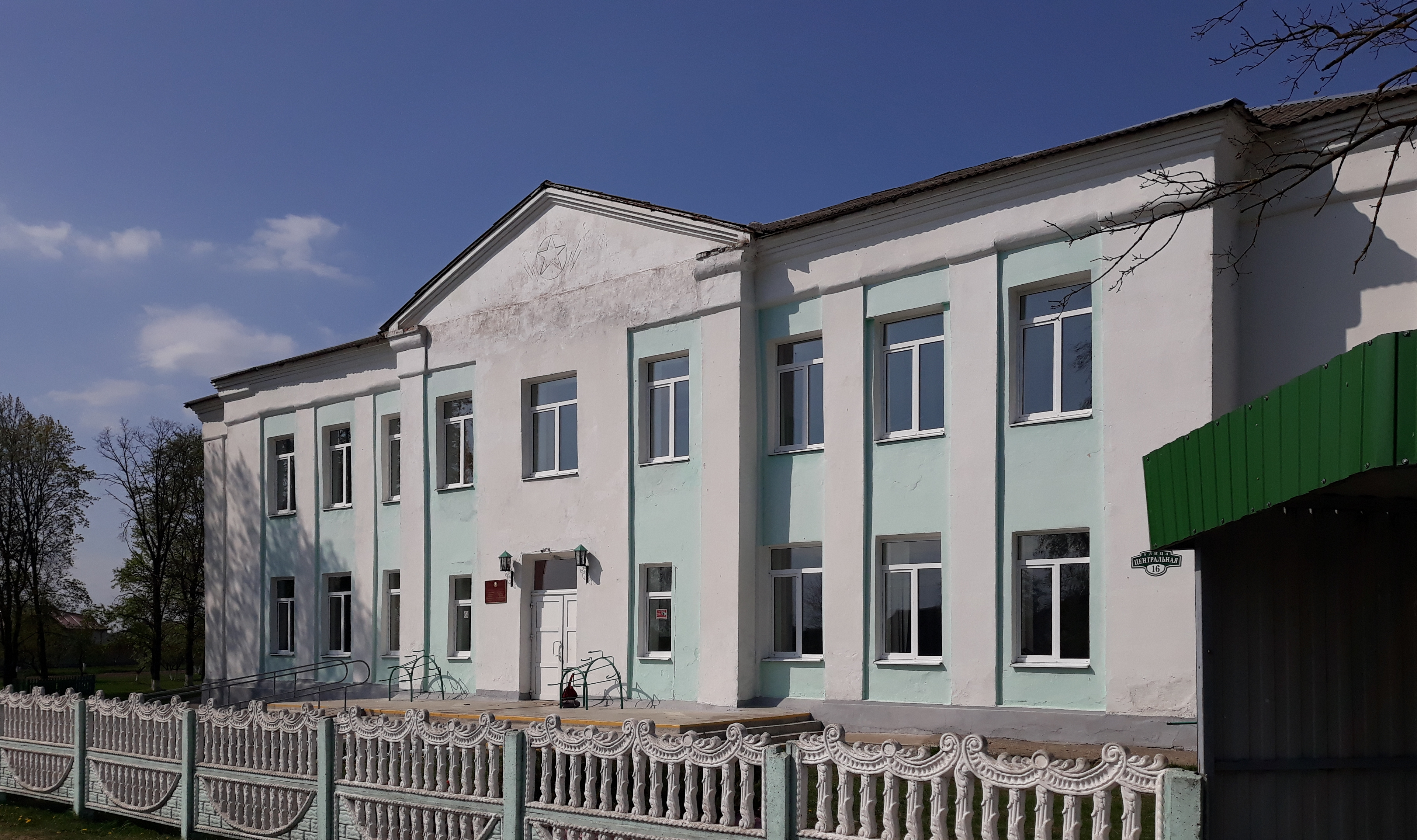 Навапольская школа